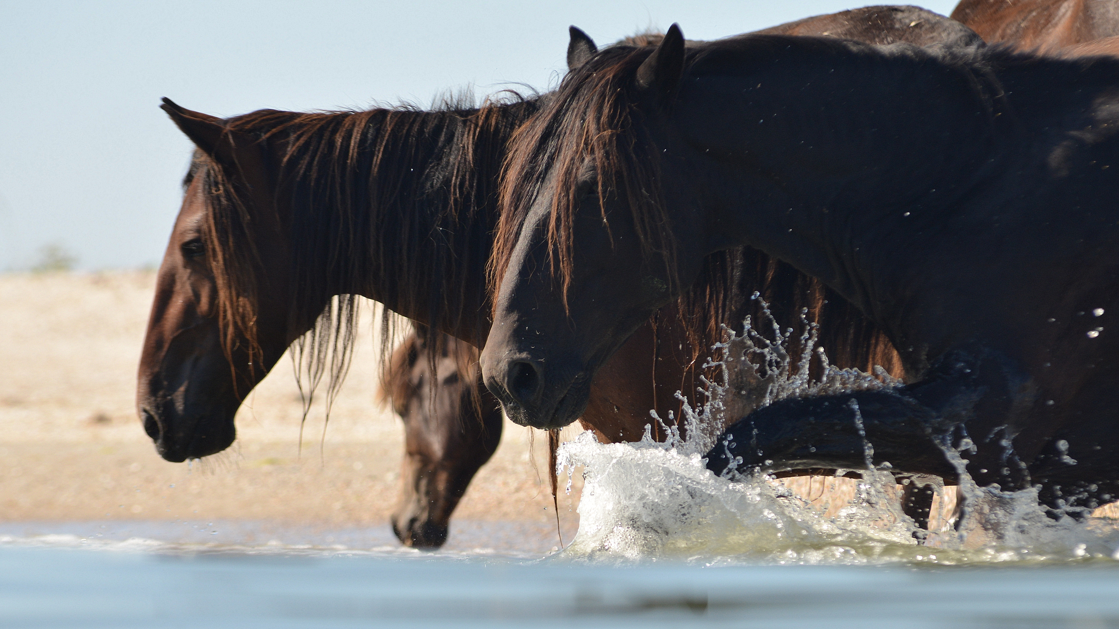 Чорноморський, м. Гола Пристань, вул. Лермонтова,1; Голопристанський район